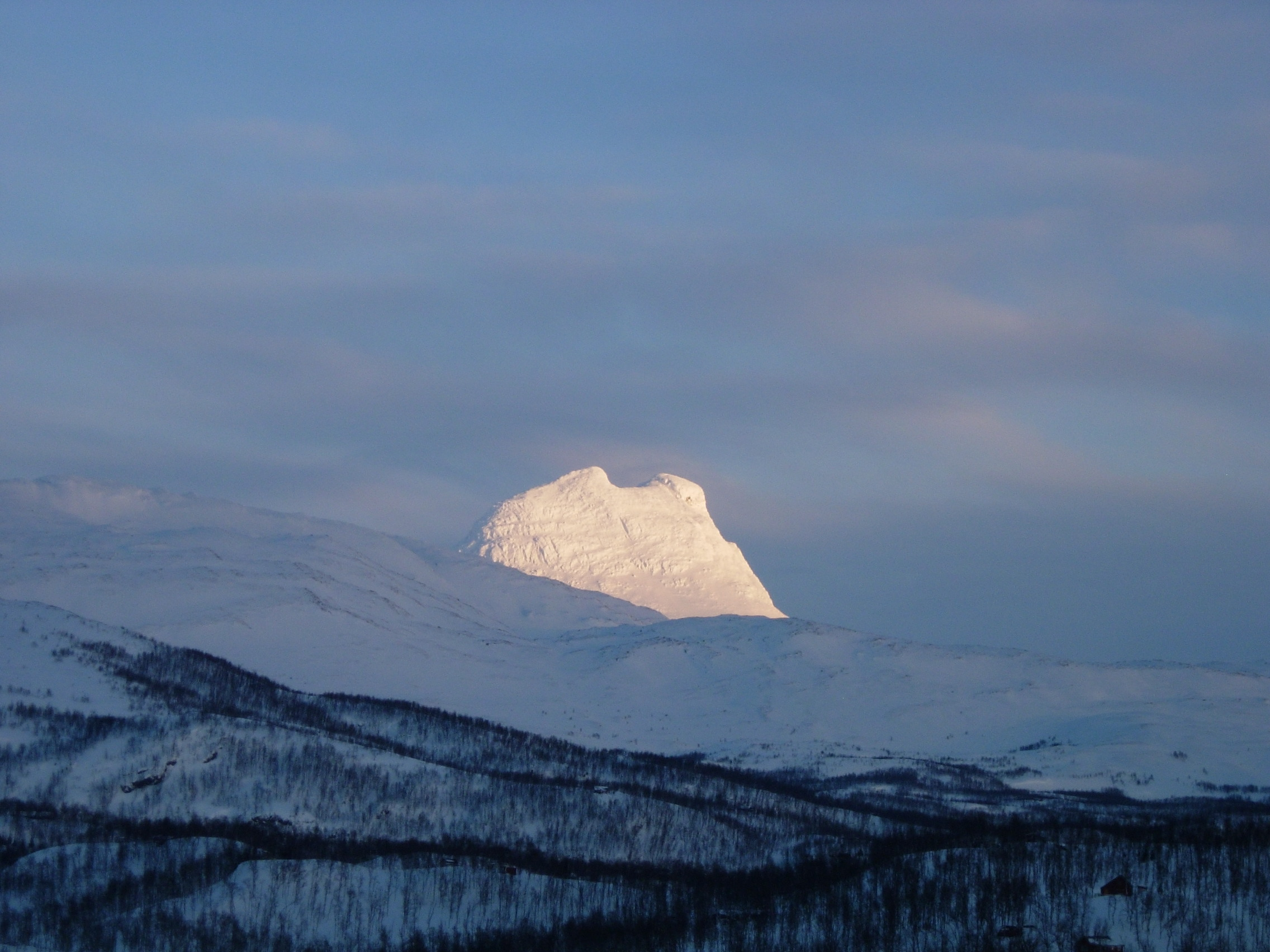 NordSaulo et fjell på grensen mellom Norge og Sverige i Sulitjelma